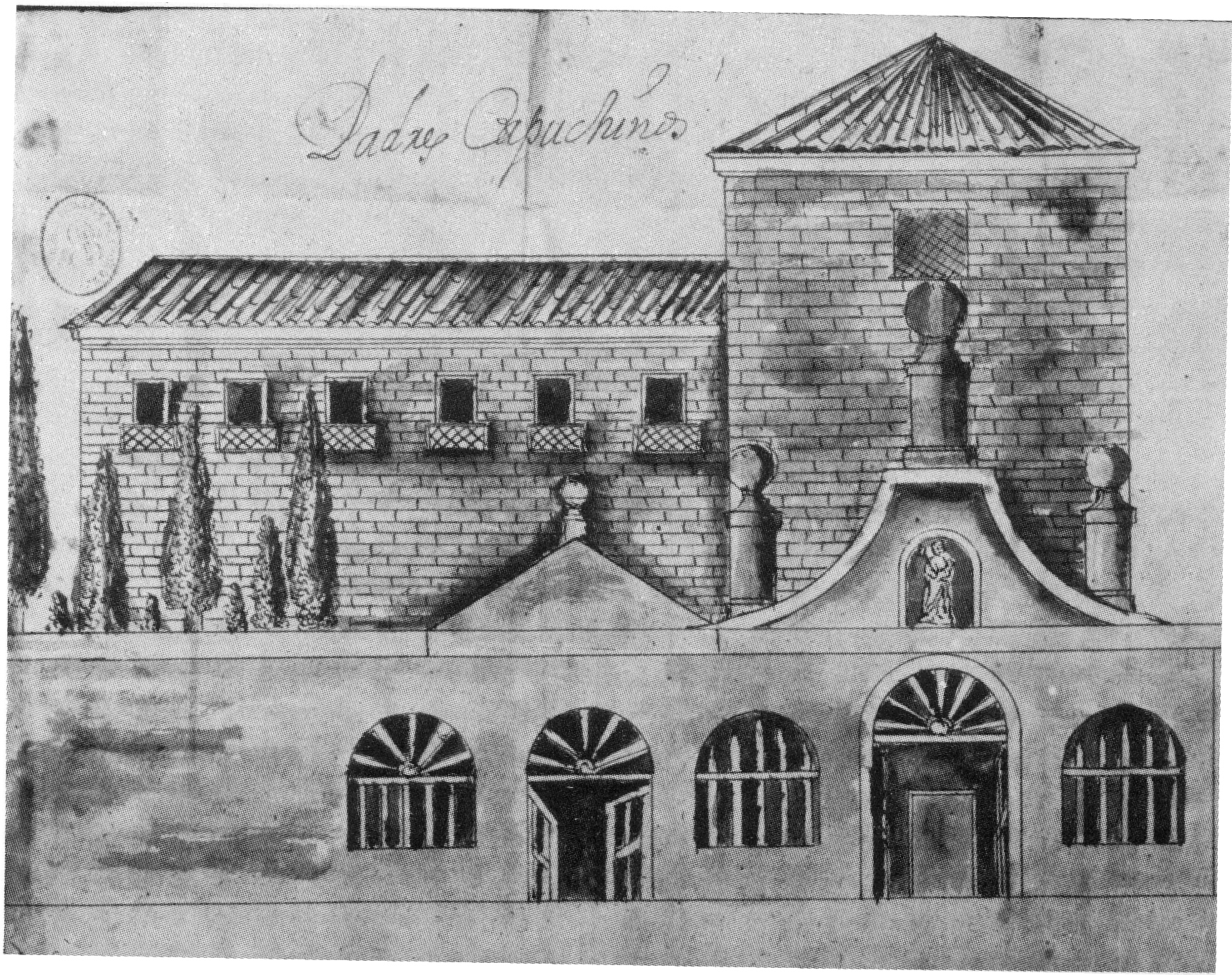 Convento de San José de Padres Capuchinos (Valladolid)